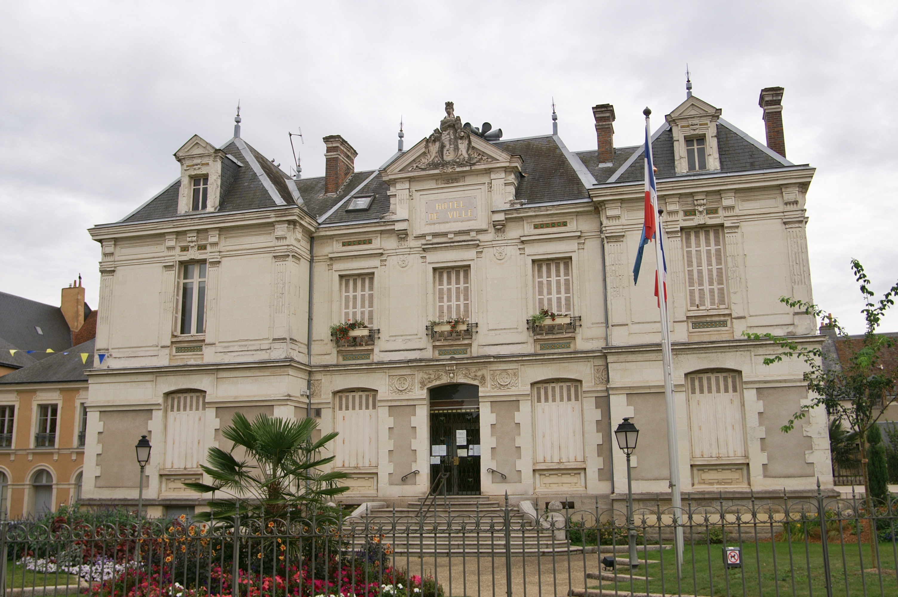 L'hôtel de ville de Saint-Calais.